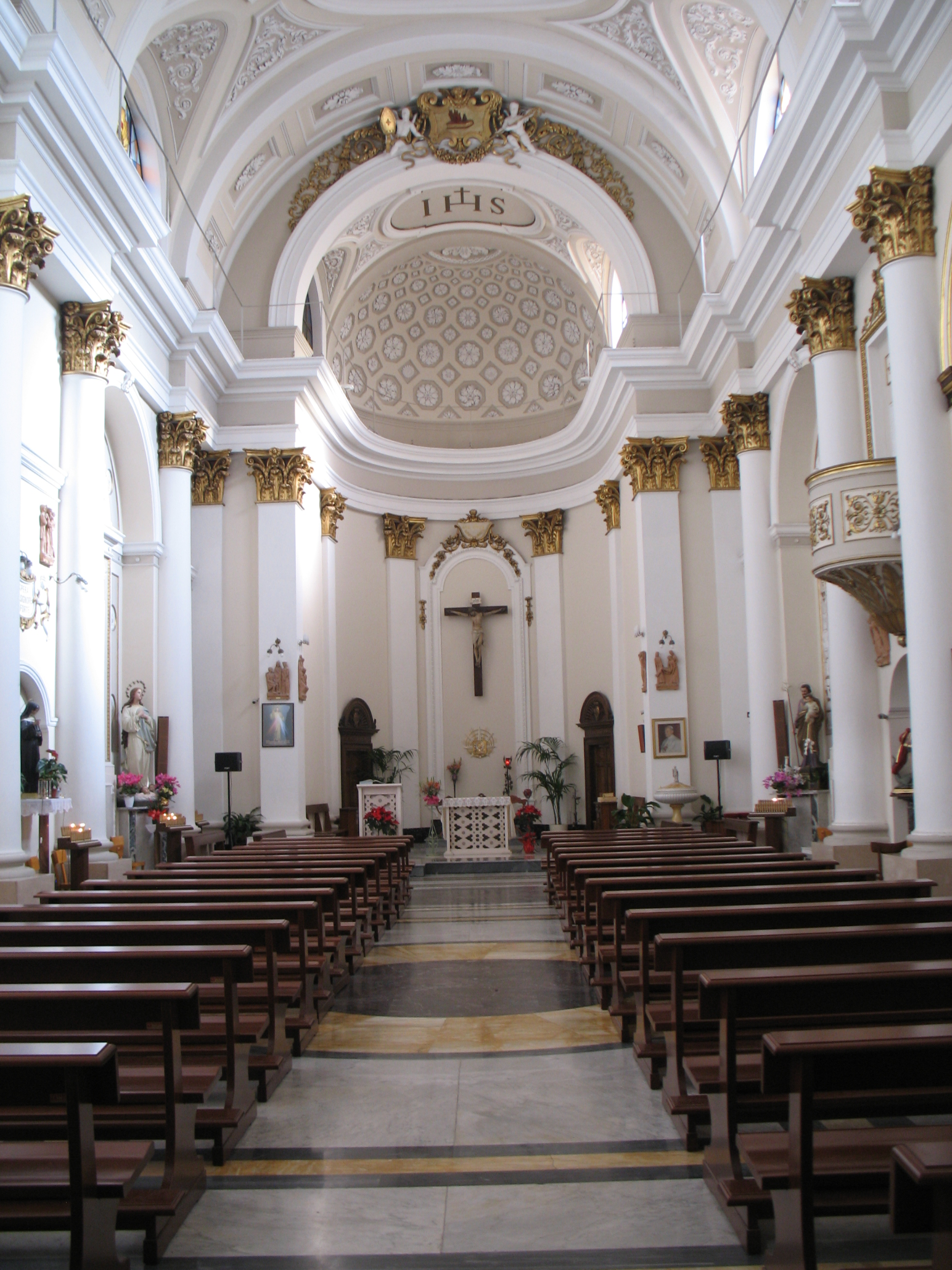 Interni della Chiesa di Sant'Antonio Abate